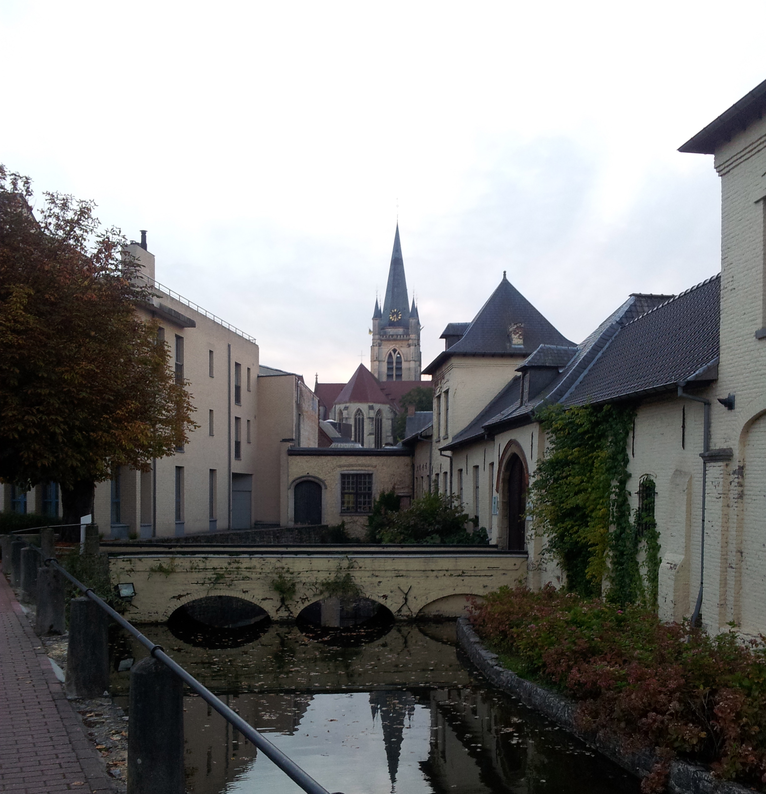 Ronse : Hoge Mote en Sint Hermeskerk